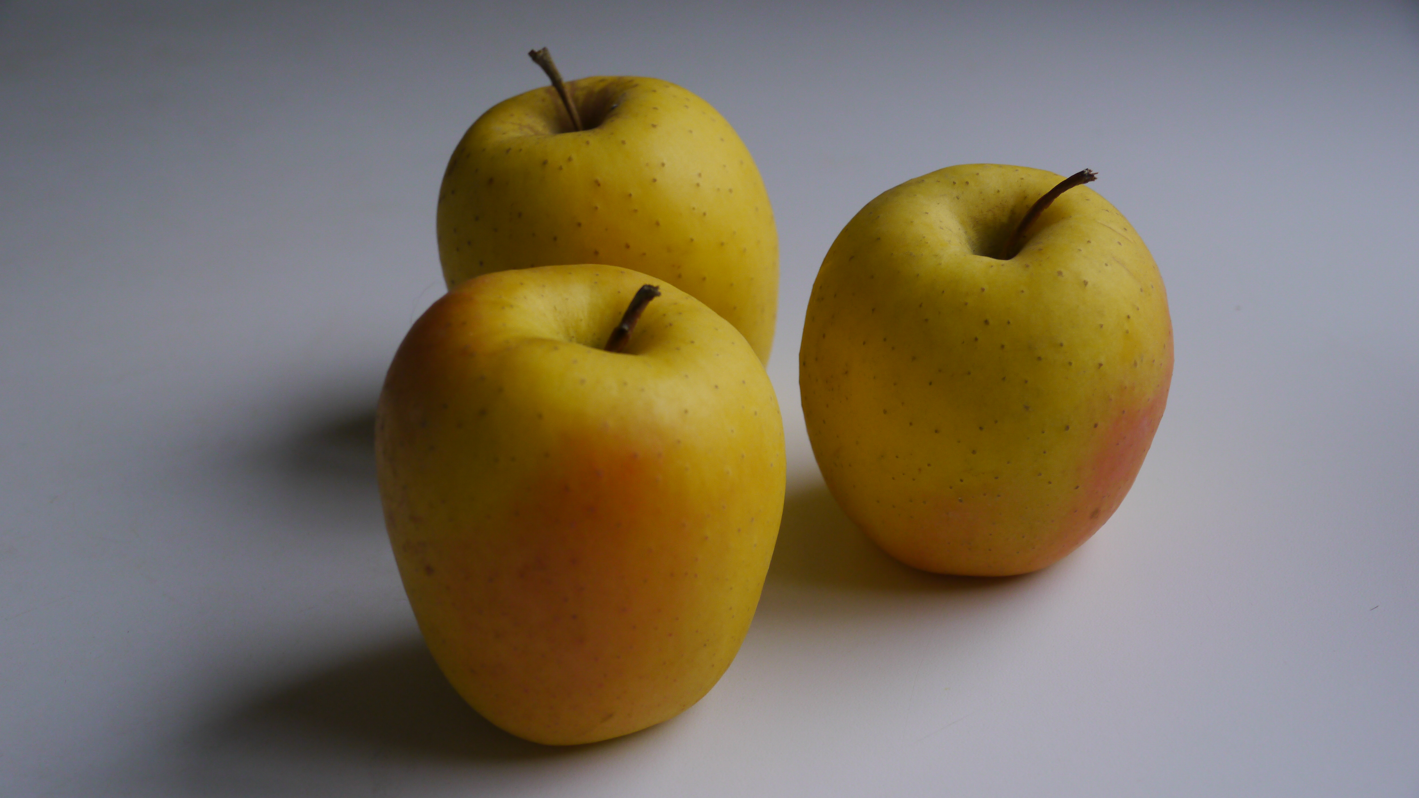 Trois pommes Tentation (nommées aussi Delblush) photographiées en novembre 2017.